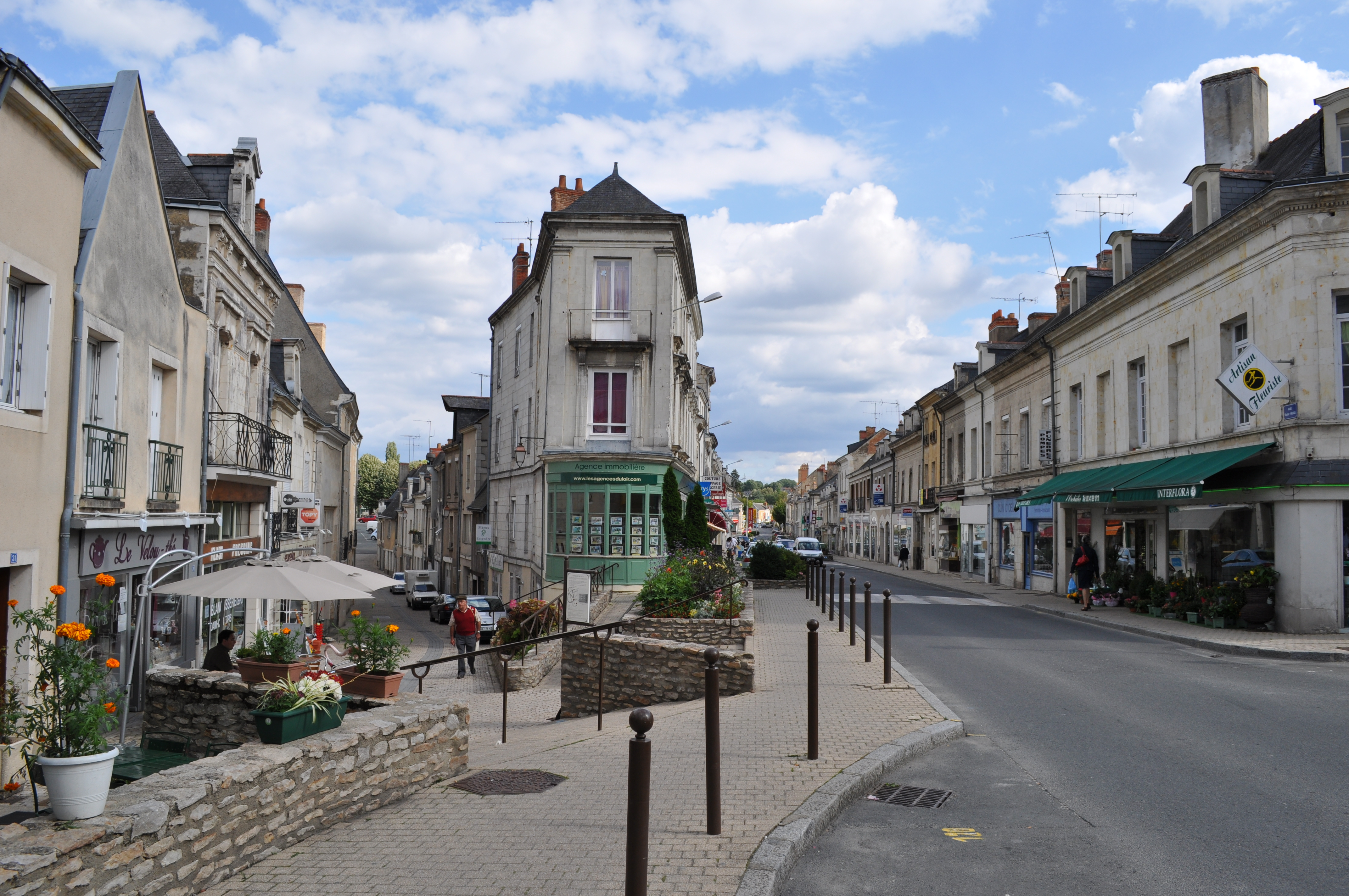 Angle de la rue Victor Hugo et de la rue Basse dans le centre de Baugé (Maine-et-Loire, France).